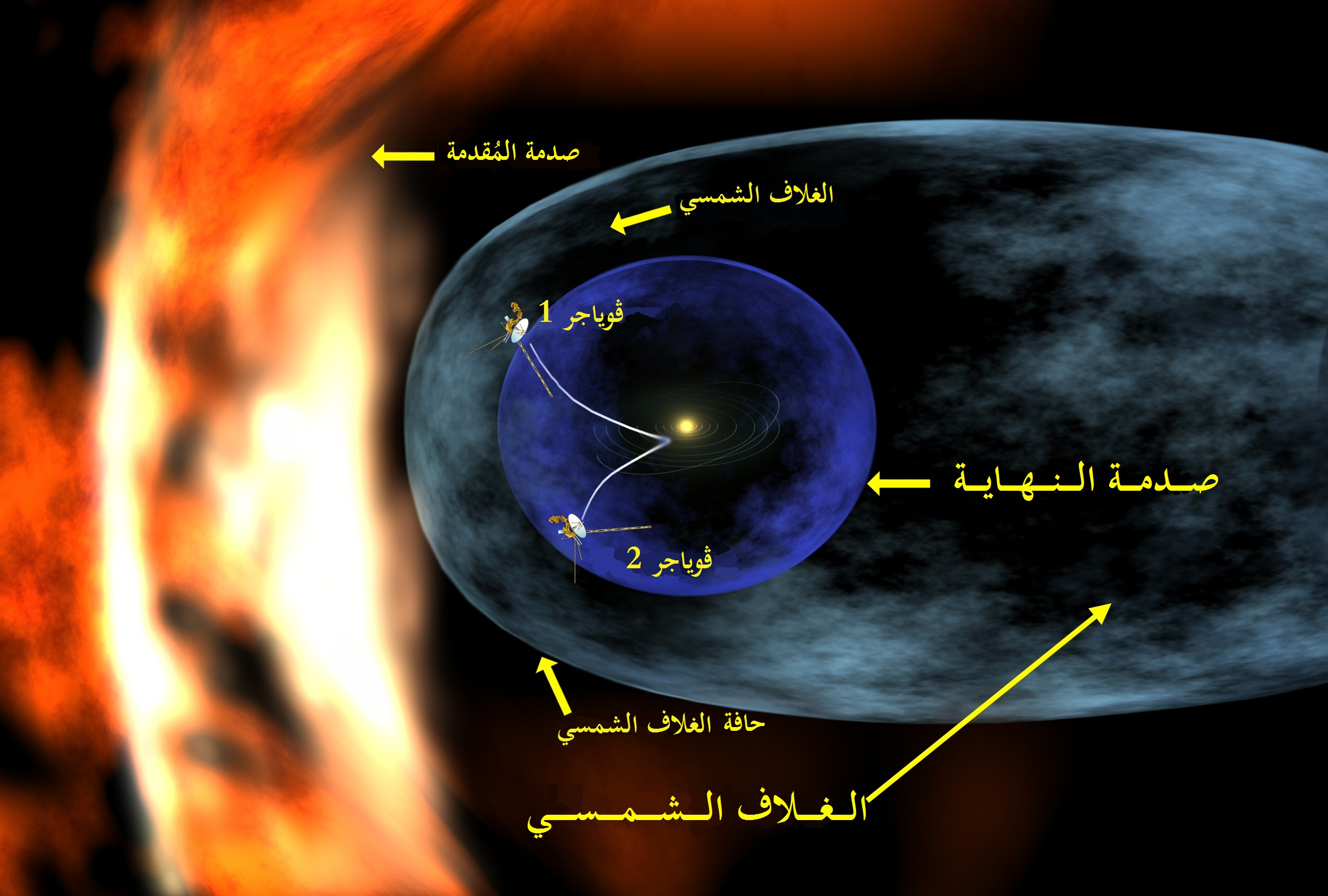 صُورة تُظهر موقع المسبارين ڤوياجر1 وڤوياجر2. يبدو مسبار ڤوياجر1 وقد عبر حُدود الغلاف الشمسي، وهي المنطقة حيثُ تمتزج الغازات البينجميَّة والرياح الشمسيَّة.